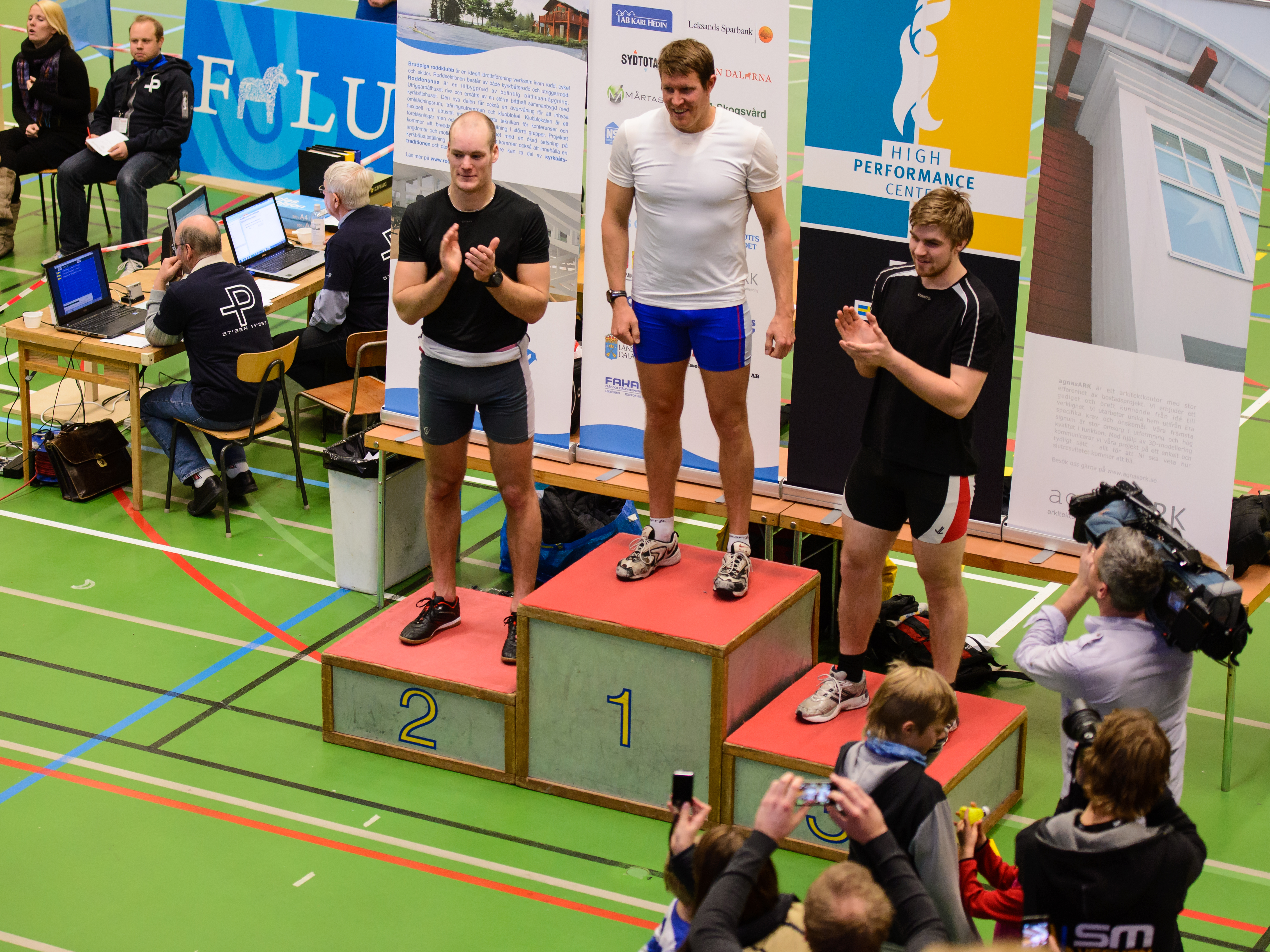 SM i rodd (inomhus), första gången grenen har SM-status. Prisutdelning för herrarnas 2 000 m. Lassi Karonen (Brudpiga RK) vann, följd av Anders Backéus (Uppsala Akademiska RS) och Christoffer Johansson (Öresjö SS Rodd).